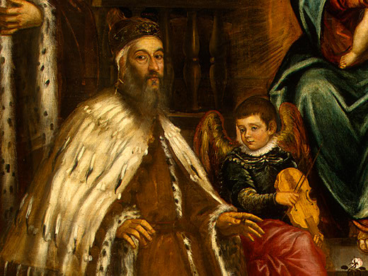 detail